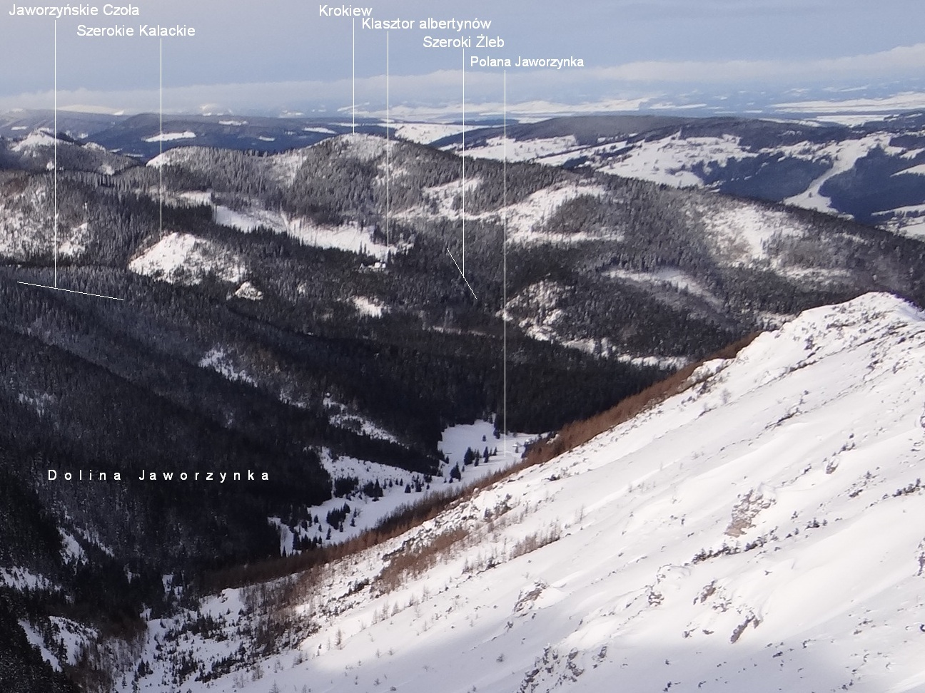 Widok ze Skupniowego Uplazu